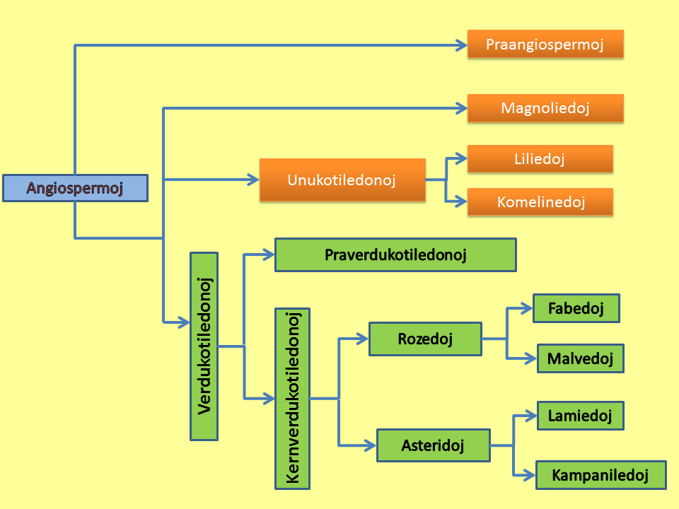 Angiospermoj